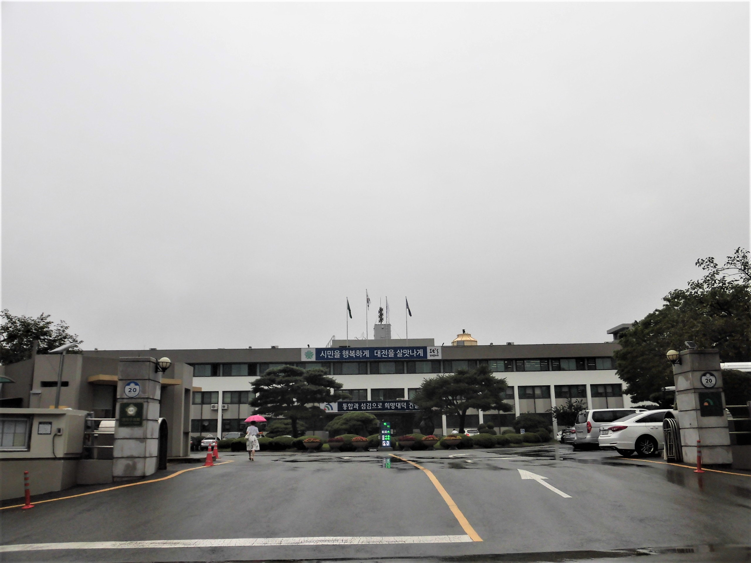 대전광역시 대덕구에 있는 대덕구청